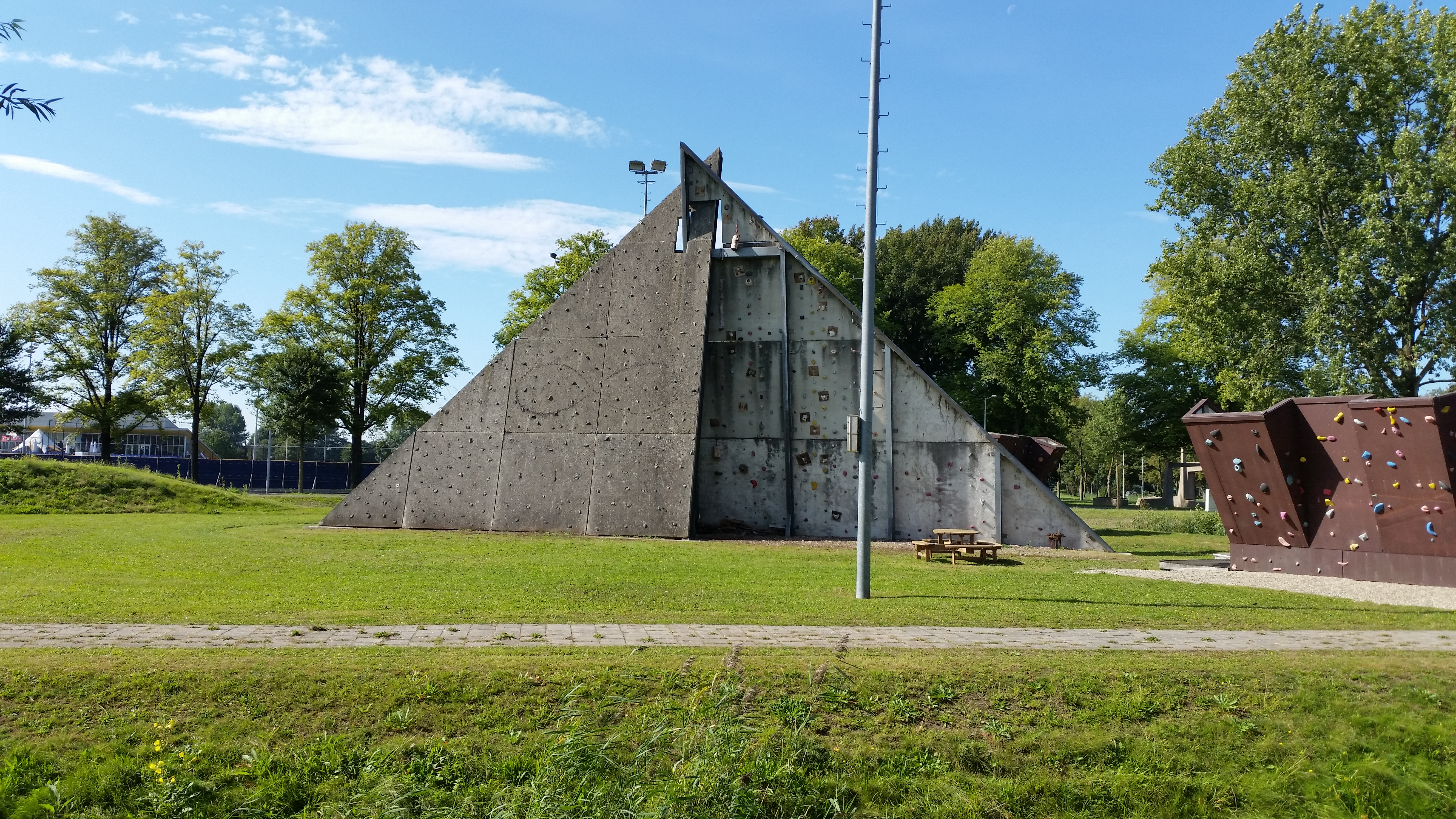 Klimterrein Dr. Meurerlaan; klimmuur en -gebouwtje